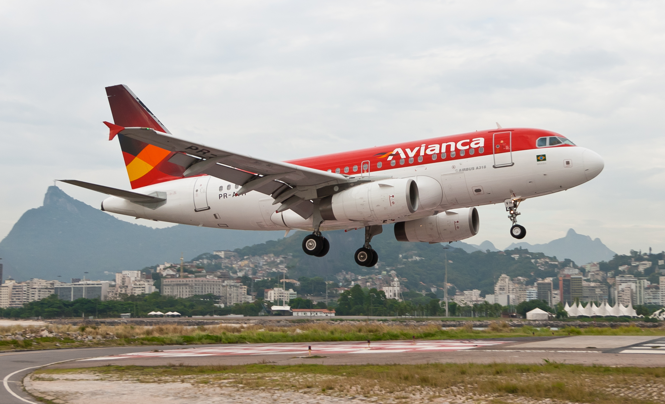 Avianca Airbus A318